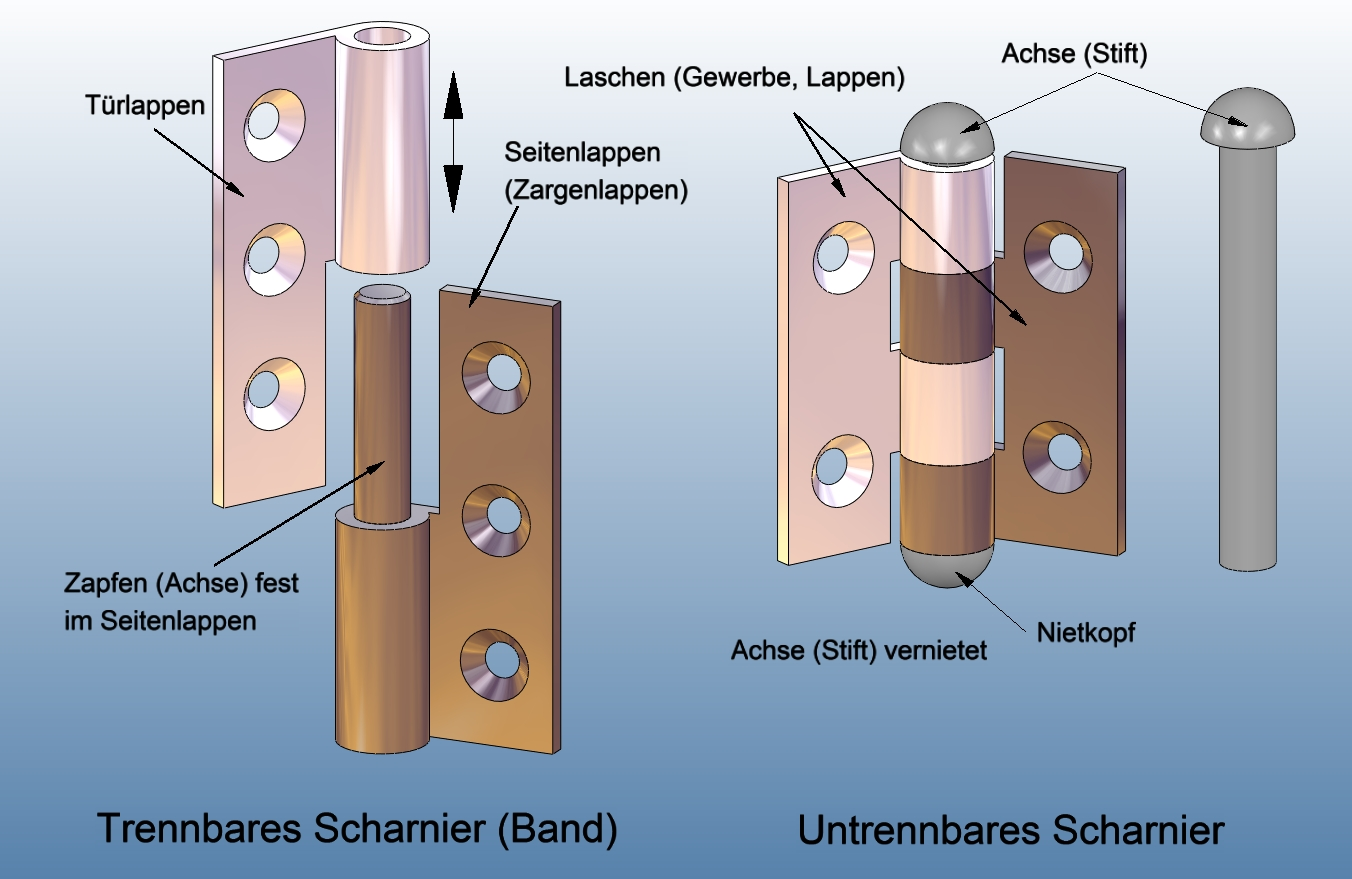 Trennbare und untrennbare Scharniere